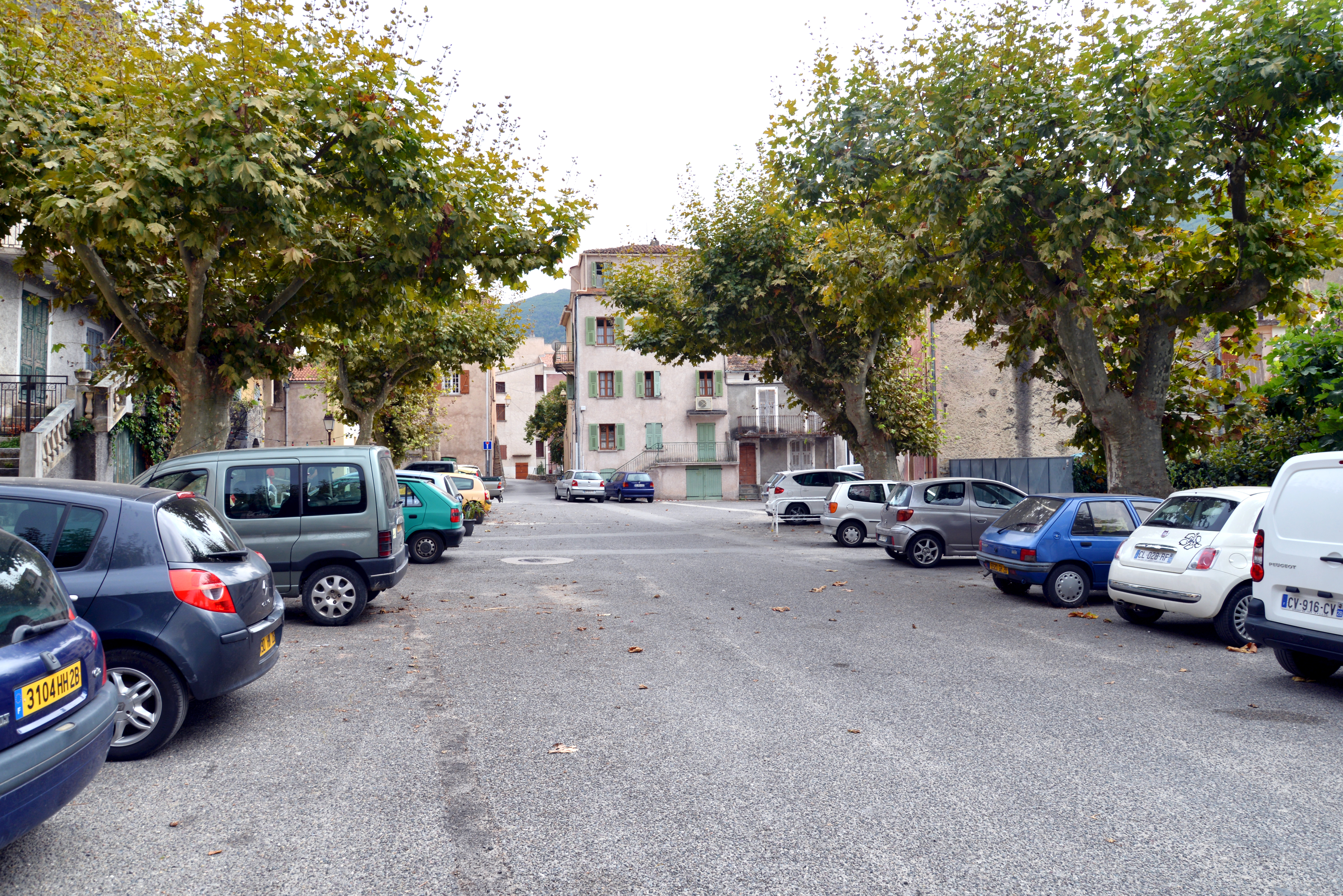 Omessa, Talcini (Corse) - Place du village